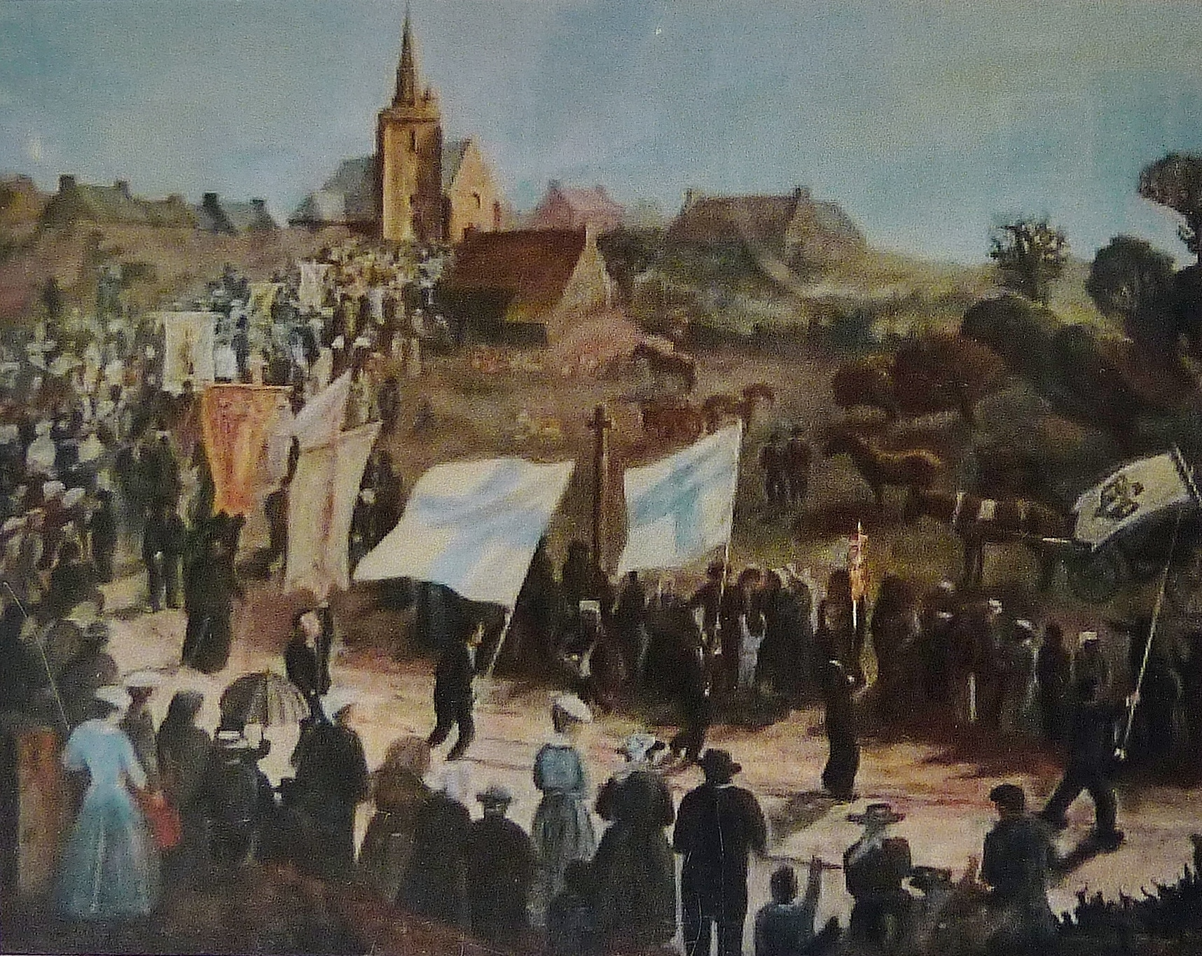 Maurice Denis : Le pèlerinage à Notre-Dame-de-la-Clarté.